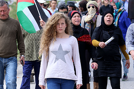 الطفلة عهد تتقدم مظاهرات الفلسطينيين بمواحهة قوات الاحتلال